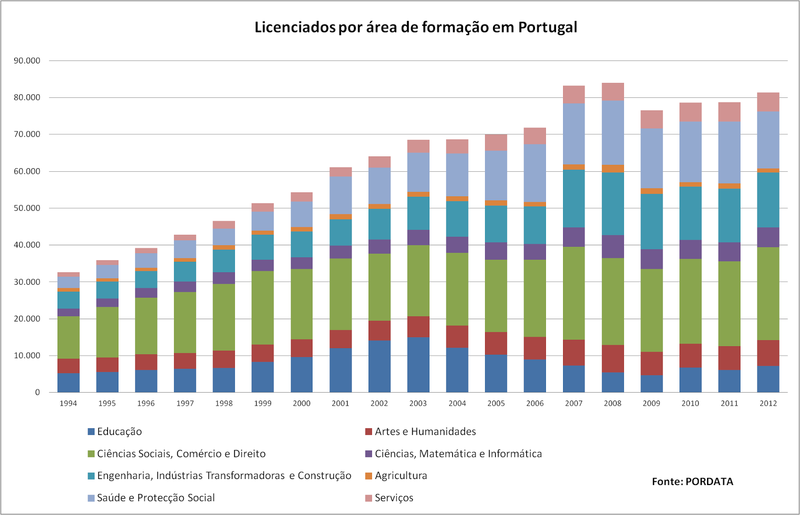 Diplomados no ensino superior: total e por área de educação e formação - Portugal